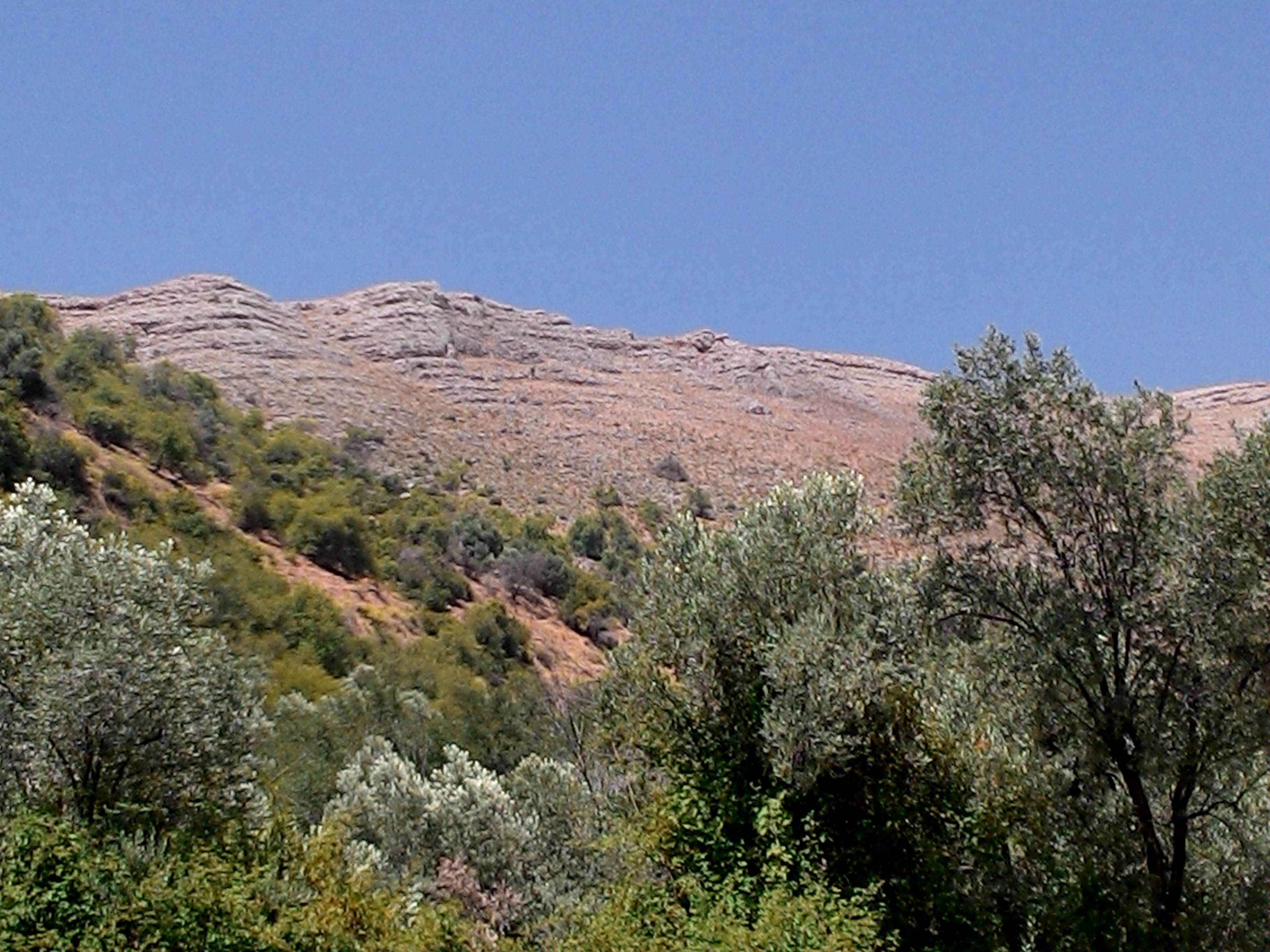 מבט אל מורדות הר כנען, ניתן לראות את הסלעים החשופים ללא צמחיה עצית